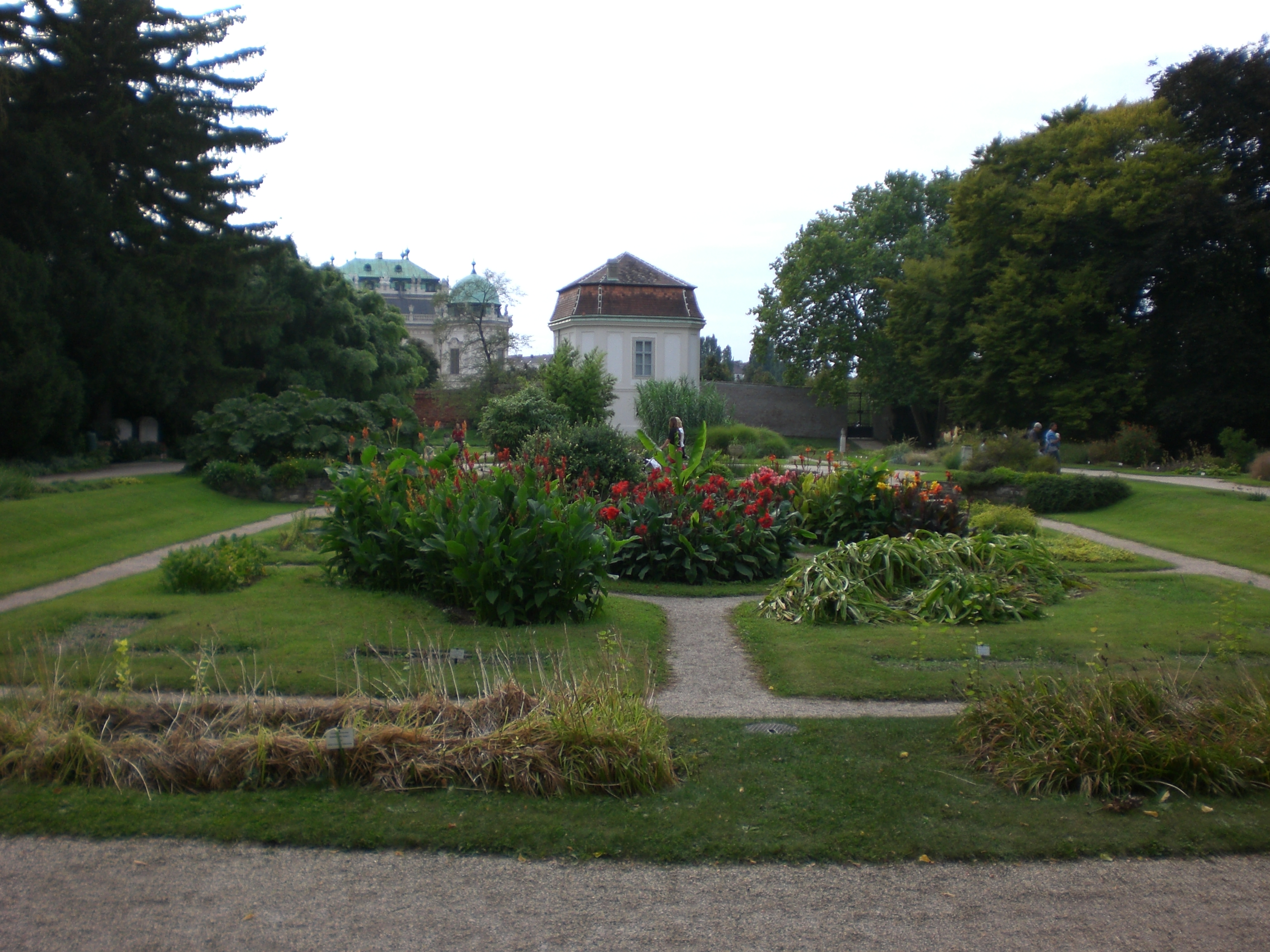 Botanischer Garten der Universität Wien